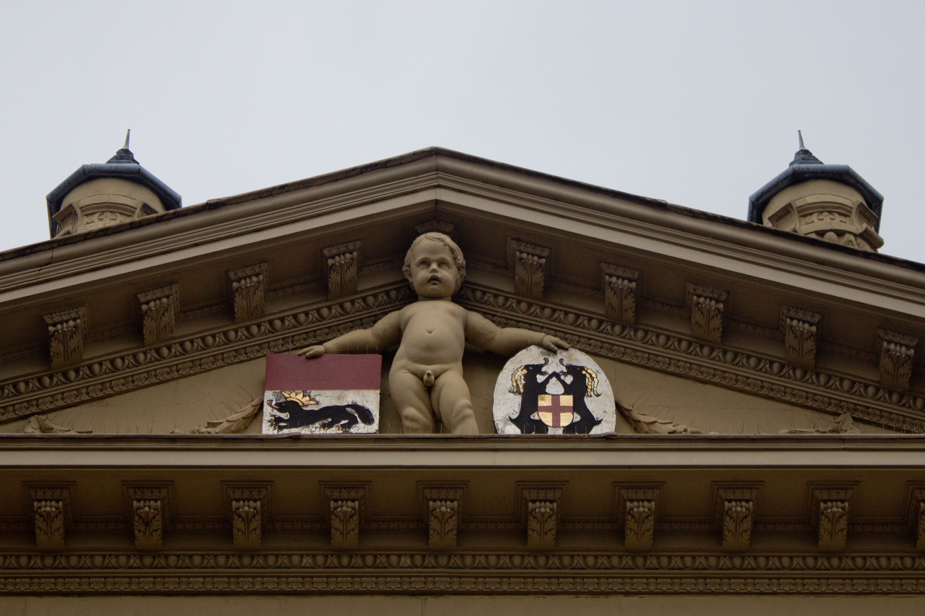 Dordrecht, detail voorgevel "de Onbeschaamde"